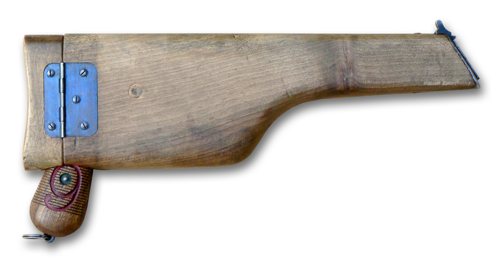 Neue Version des Bildes " mit neutralem weißen Hintergrund